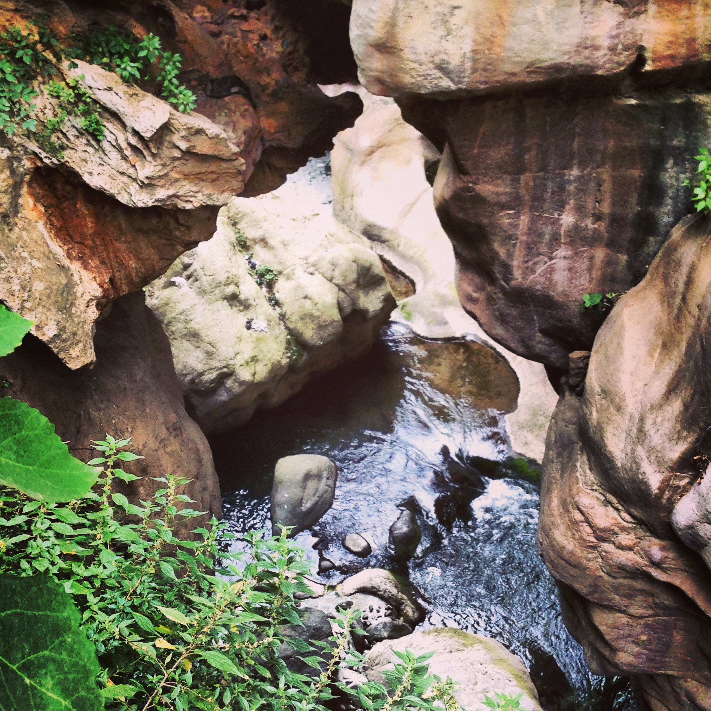 Սատանայի կամուրջ